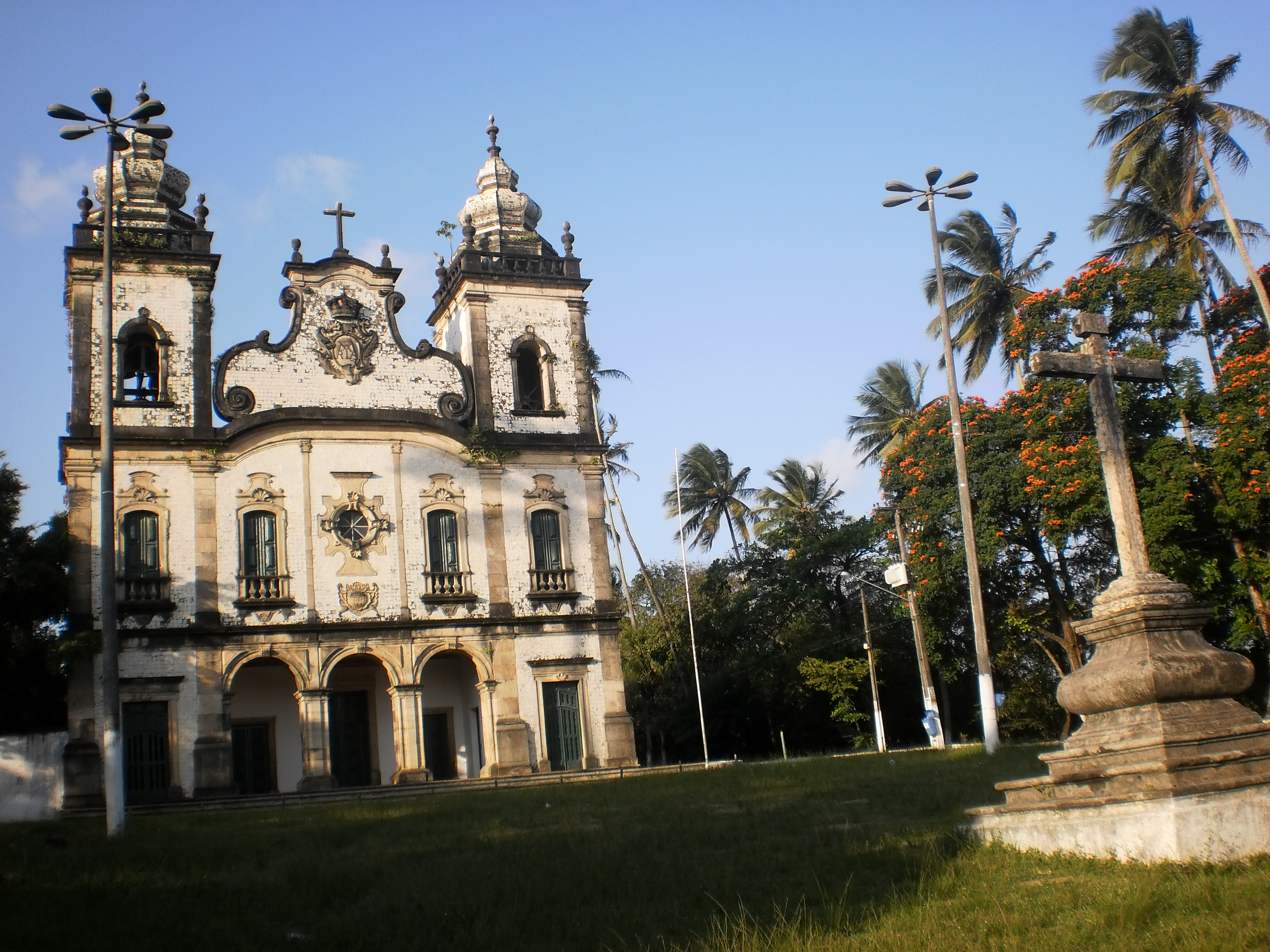 igreja nª sª dos prazeres